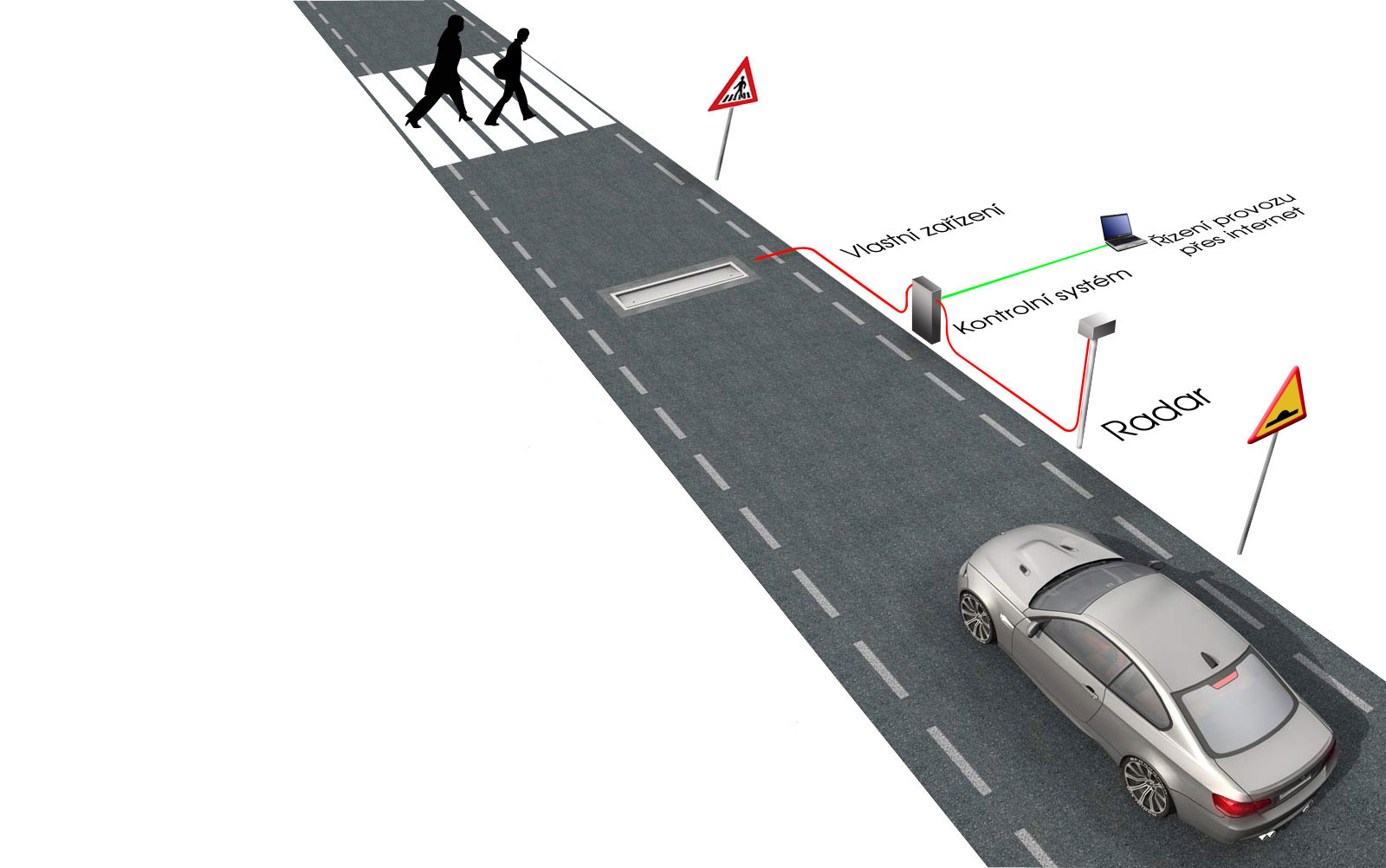 Schéma Actibumpu